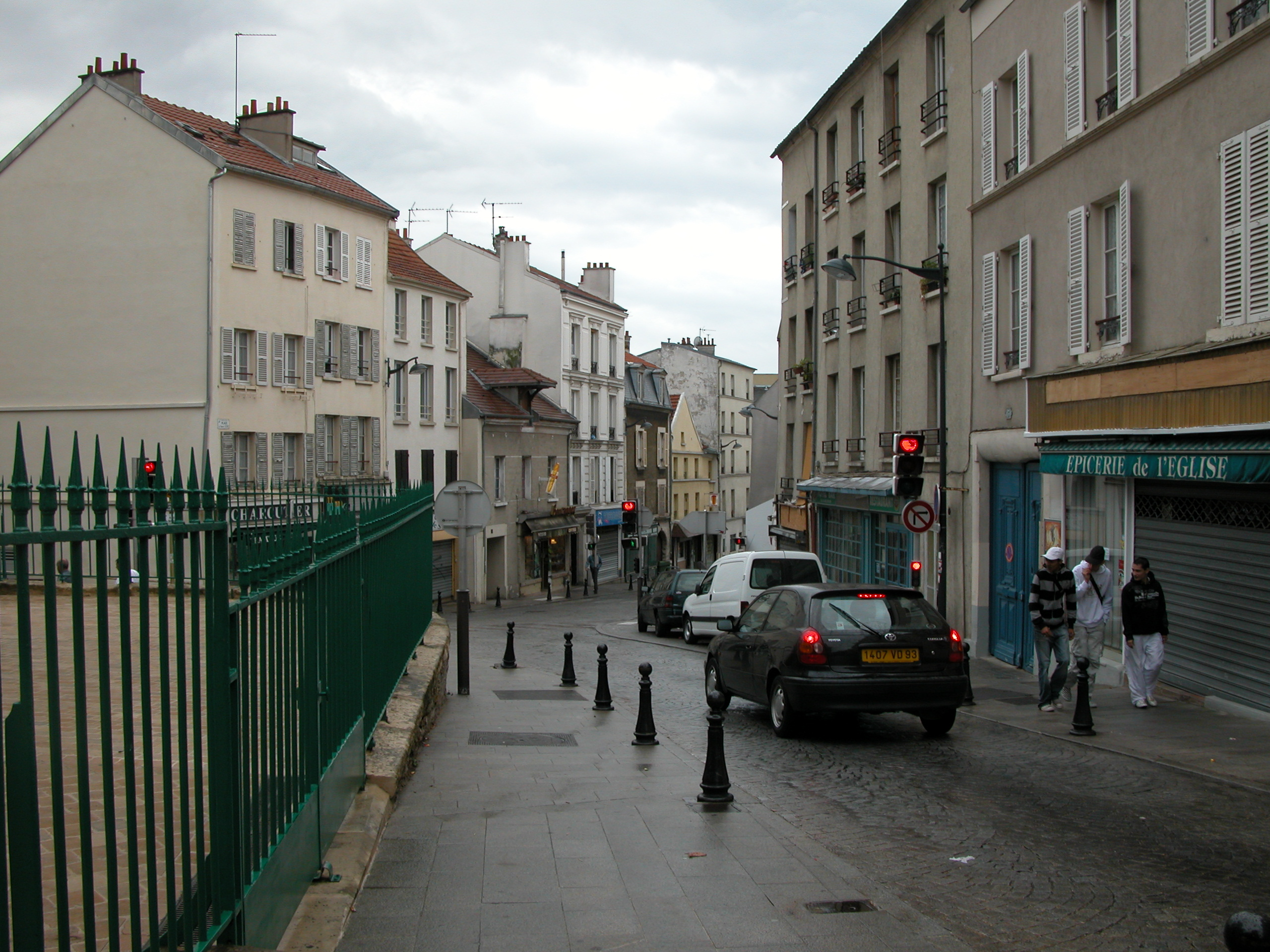 Rue de Rosny, at Fontenay-sous-Bois